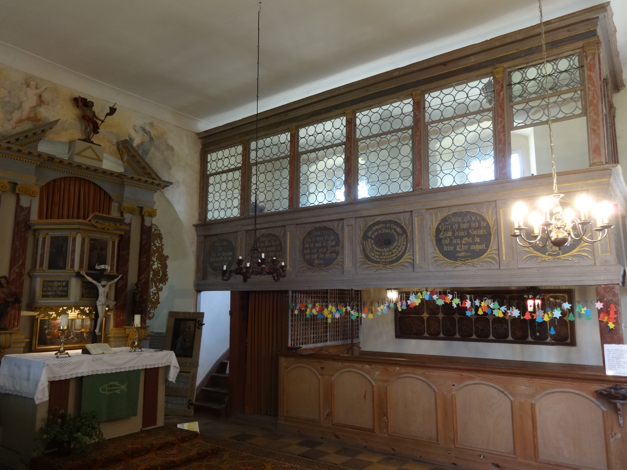 Reichhaltige Ausstattung der Dorfkirche Blankensee, Trebbin, Brandenburg